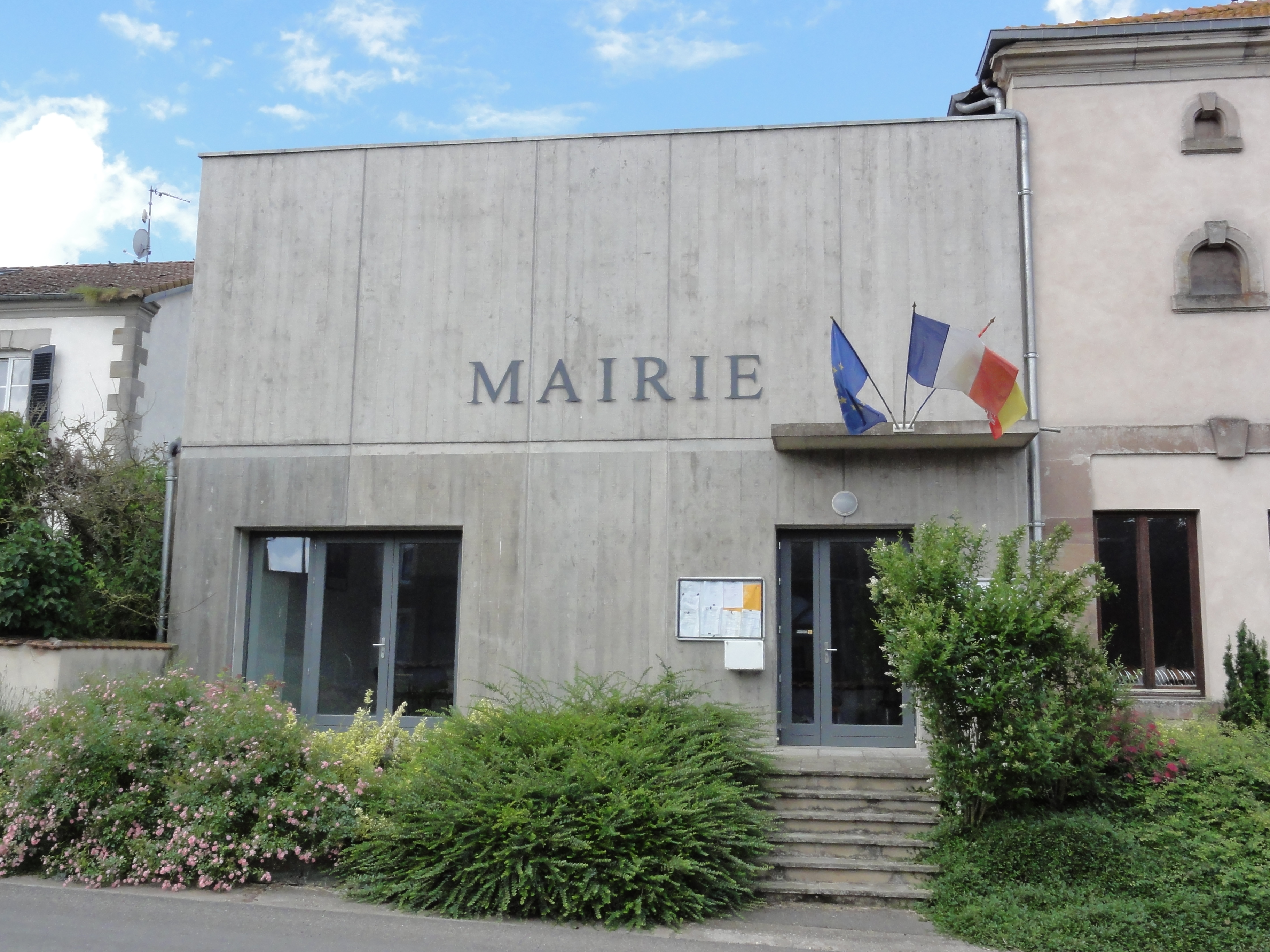 Hénamémil (M-et-M) mairie